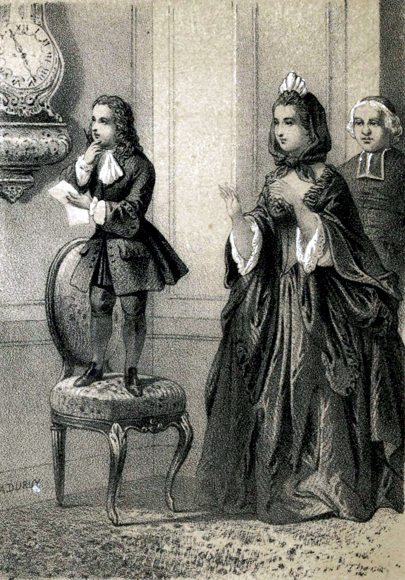 Vaucanson enfant dans Les petits savants.